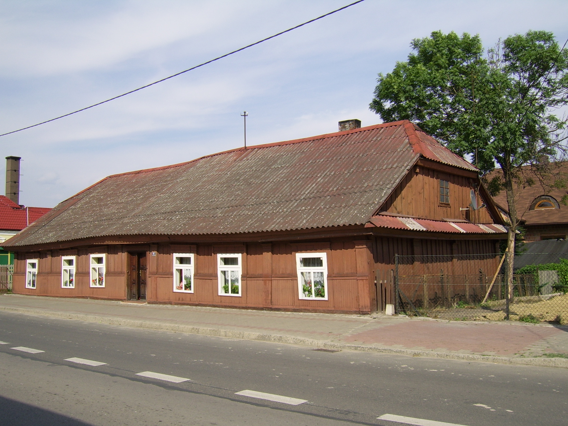 Skalbmierz - dom z XIX wieku.